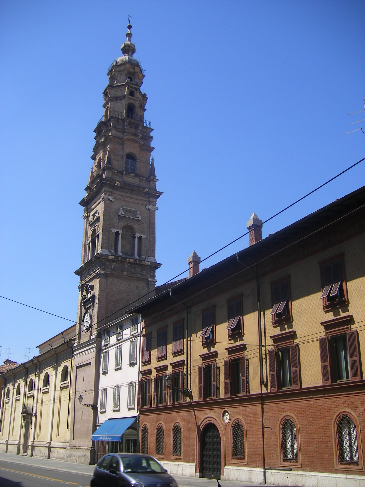 Parma